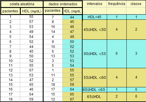 Exemplo de Histograma - HDL de 18 pacientes. Ordenando os dados, definindo intervalos e classes, com o software Origin.